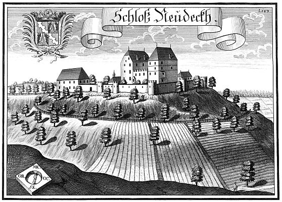 ehemaliges Schloss Neudeck